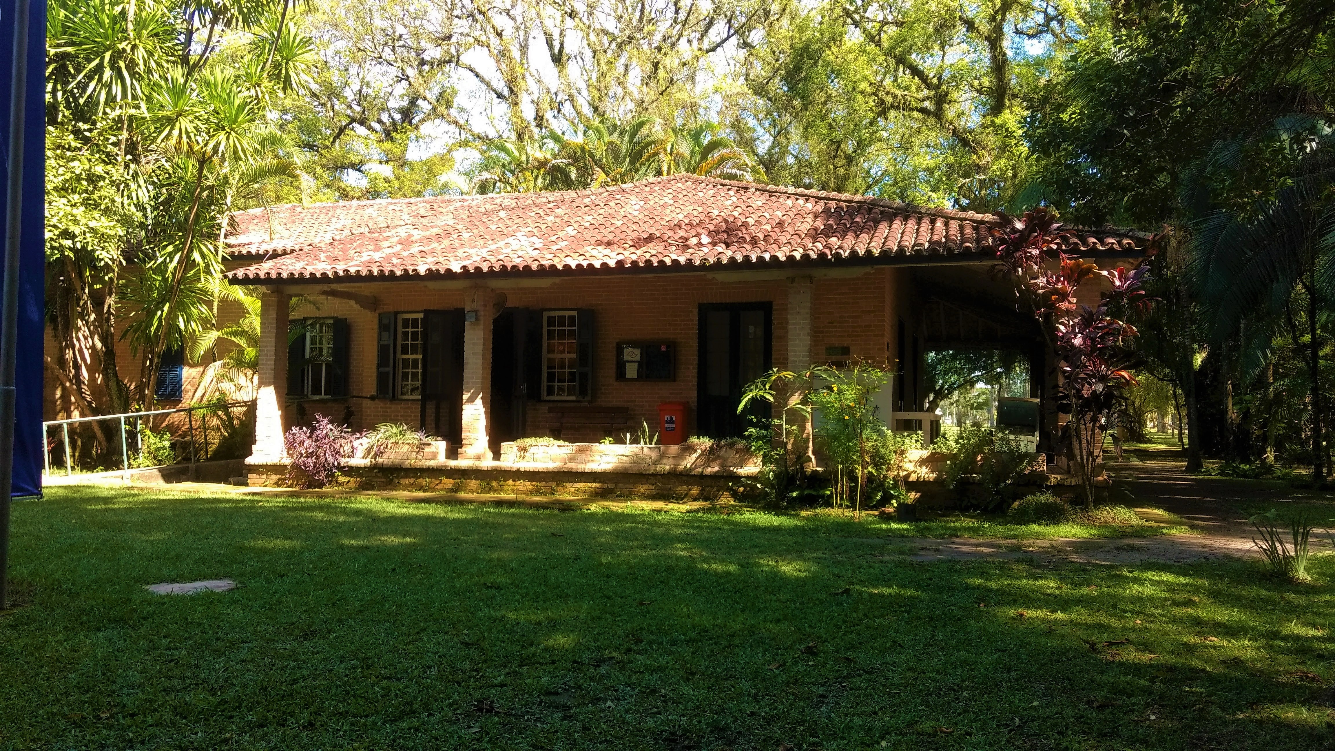 Vista lateral esquerda da casa um do Museu do Folclore de São José dos Campos, Brasil.